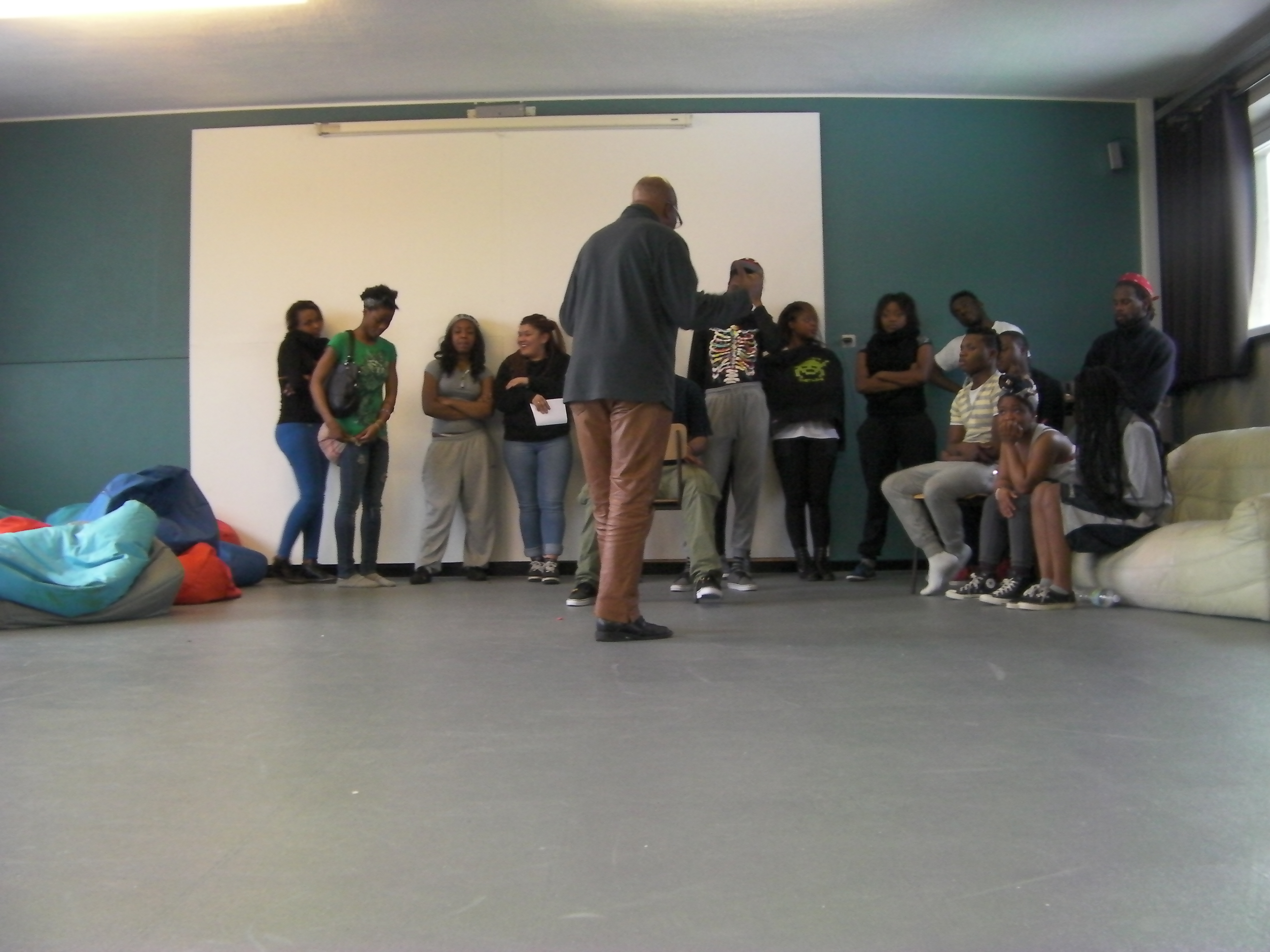 Activité de la recherche-action "Acteurs de Changements"